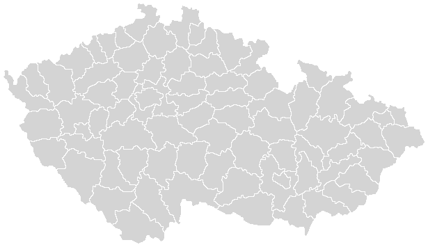 Mapka českých okresů od roku 2007 (do doby vytvoření mapky)